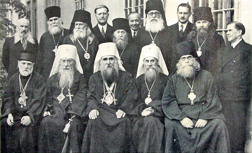 После первого заседания в Патриаршем дворце в Серемских Карловцах под председательством Патриарха Варнавы. 31 октября–18 ноября 1935 года архиепископ Анастасий принимал участие в совещании под председательством Патриарха Сербского Варнавы (Росича) по объединению Русской Церкви Заграницей. Тогда же архиепископ Анастасий был возведён патриархом Варнавой в сан митрополита и оставлен на постоянное пребывание в Сремских Карловцах в качестве помощника находившегося в болезненном состоянии Блаженнейшего митрополита Антония.